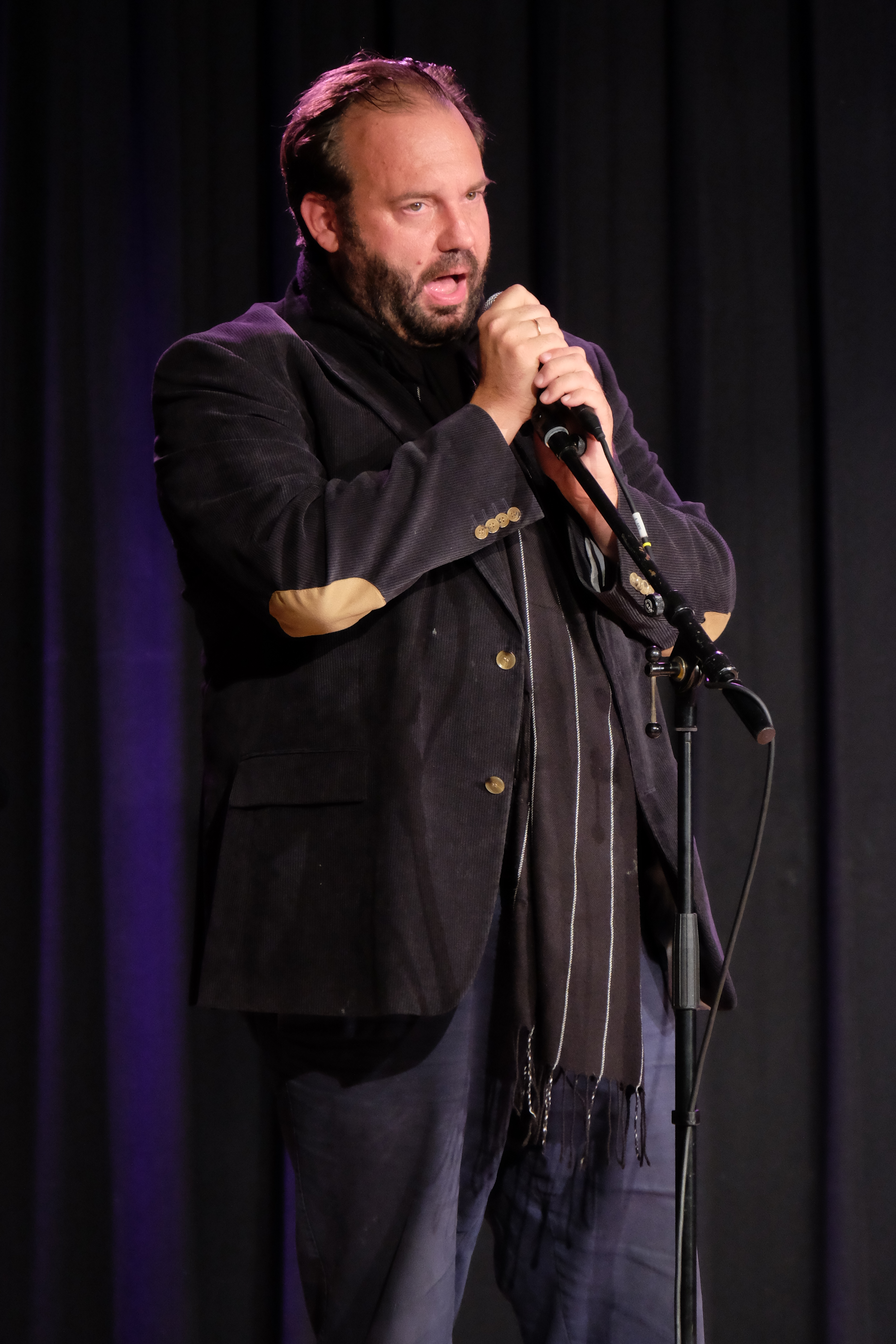 Florian Rexer an der Kulturpreisverleihung Amriswil am 3. Oktober 2018 im Kulturforum